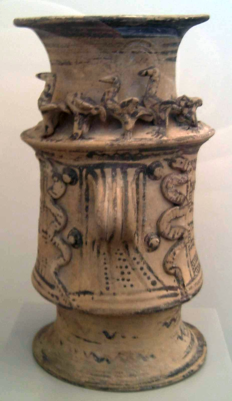 Zweihenklige Röhre (Eschara) für Trankspenden mit anmodellierten Schlangen und Vögeln, von Rhodos, um 720 v. Chr.